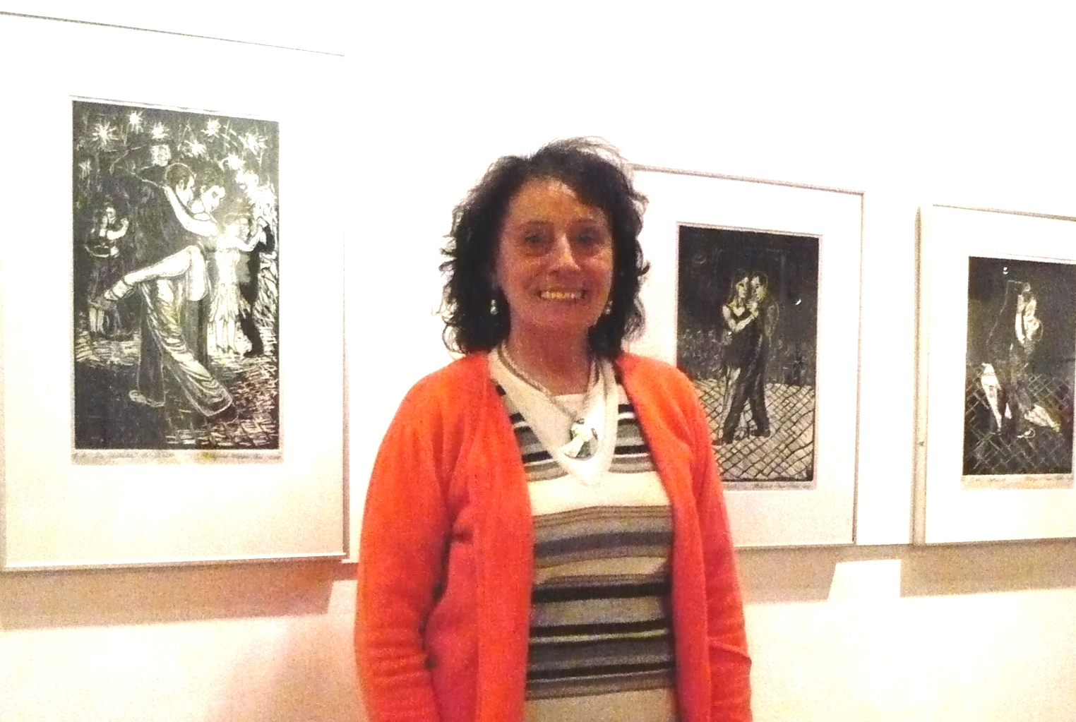 Das Foto stellt die Künstlerin Hildegard Klepper-Paar vor ihren eigenen Bildern in der Kunstausstellung "siebenfeminin3" 2009 in der Großen Rathausgalerie Landshut dar.